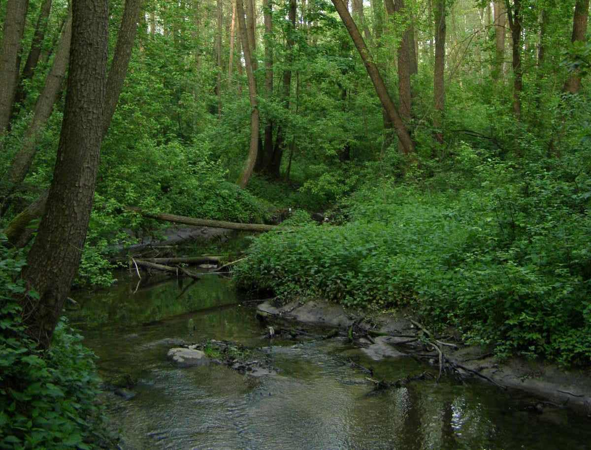 Srebrna river, Poland Rzeka Srebrna na terenie Leśnictwa Stankowizna pod Mińskiem Mazowieckim